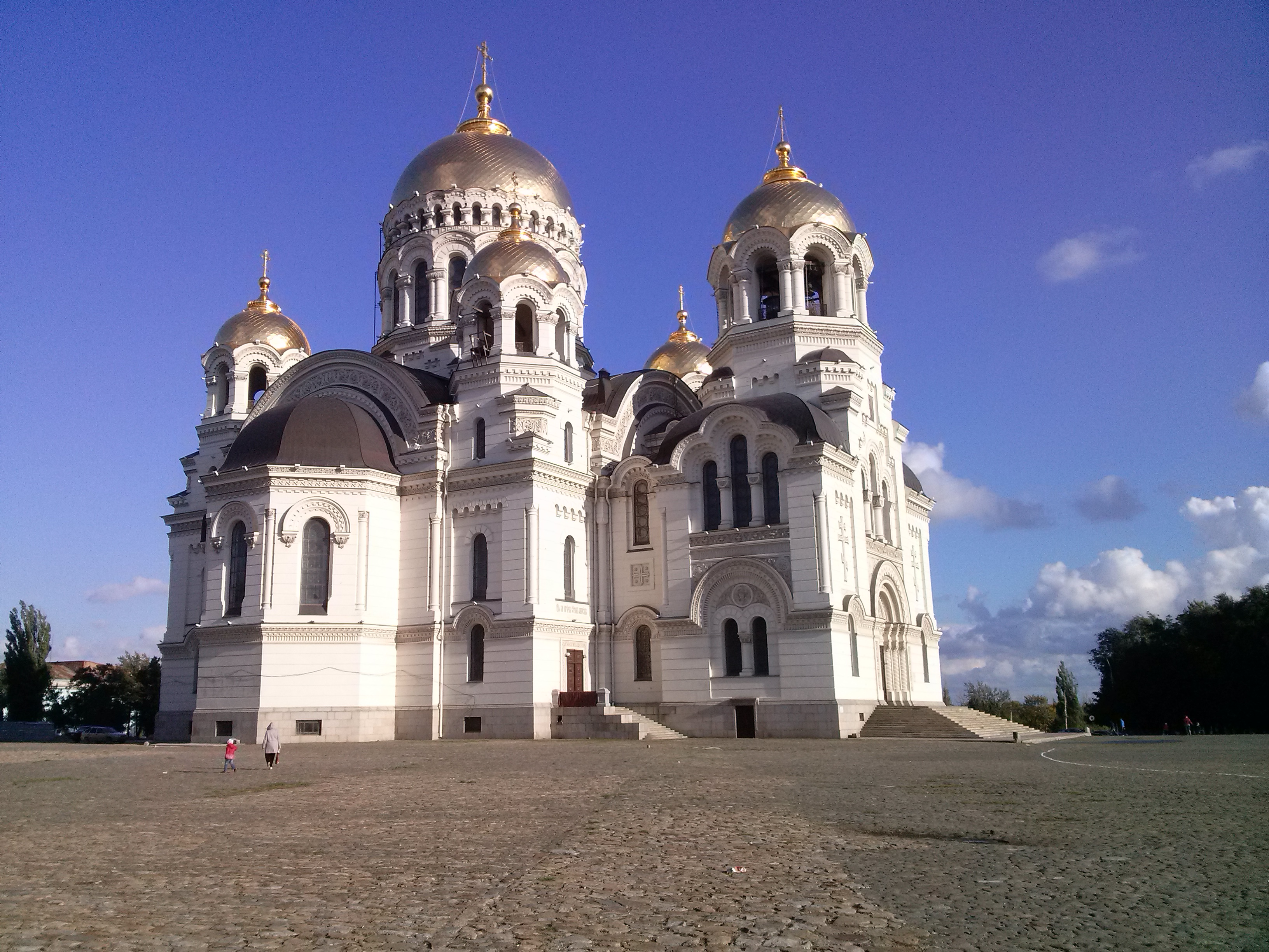 Войсковой Вознесенский собор — усыпальница Героев Отечественной войны 1812 года: М. И. Платова, В. В. Орлова-Денисова, И. Е. Ефремова (Ростовская область, Новочеркасск, Ермака площадь, 1)